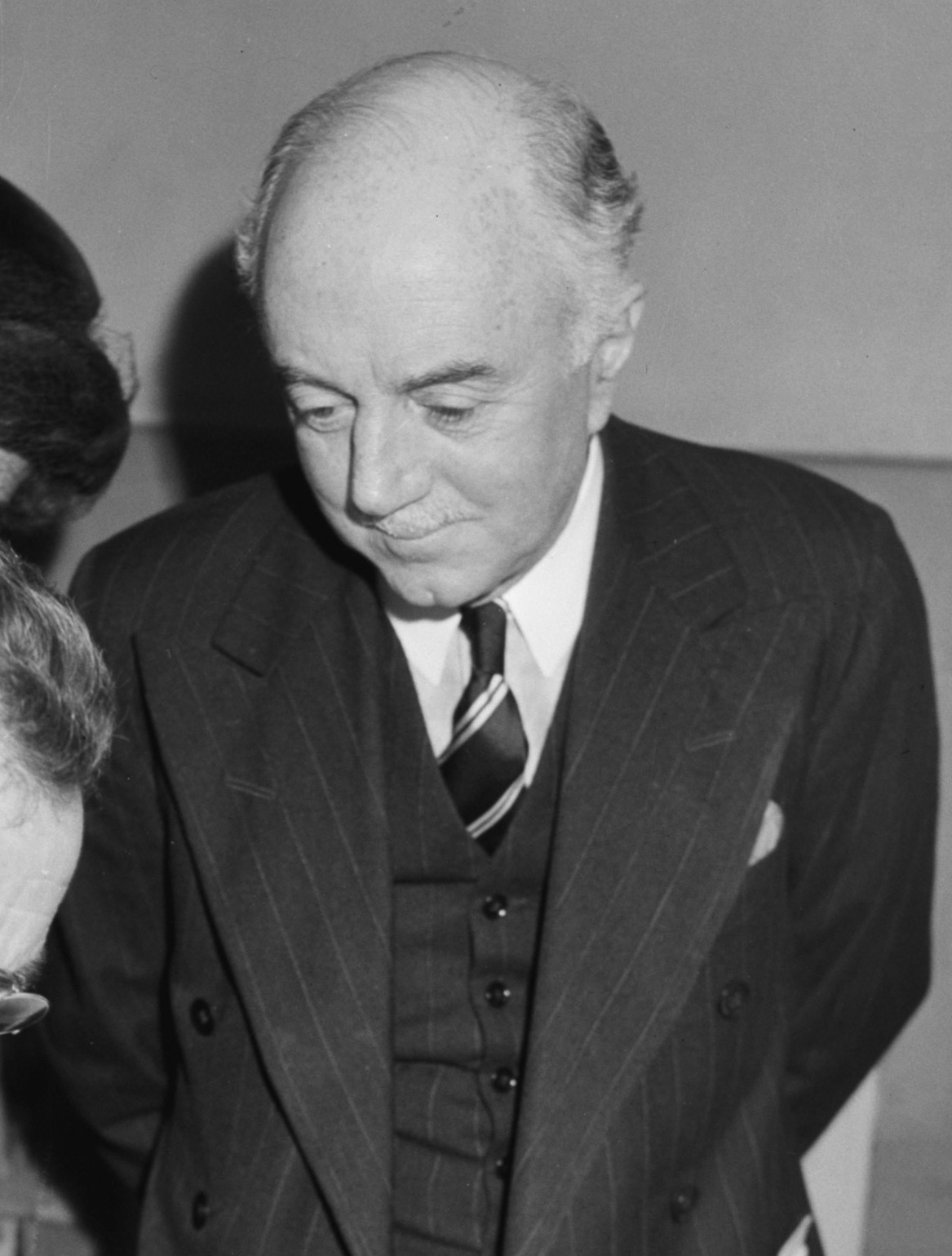 Engelse Ambassadeur te Amsterdam (Nenile Butler)